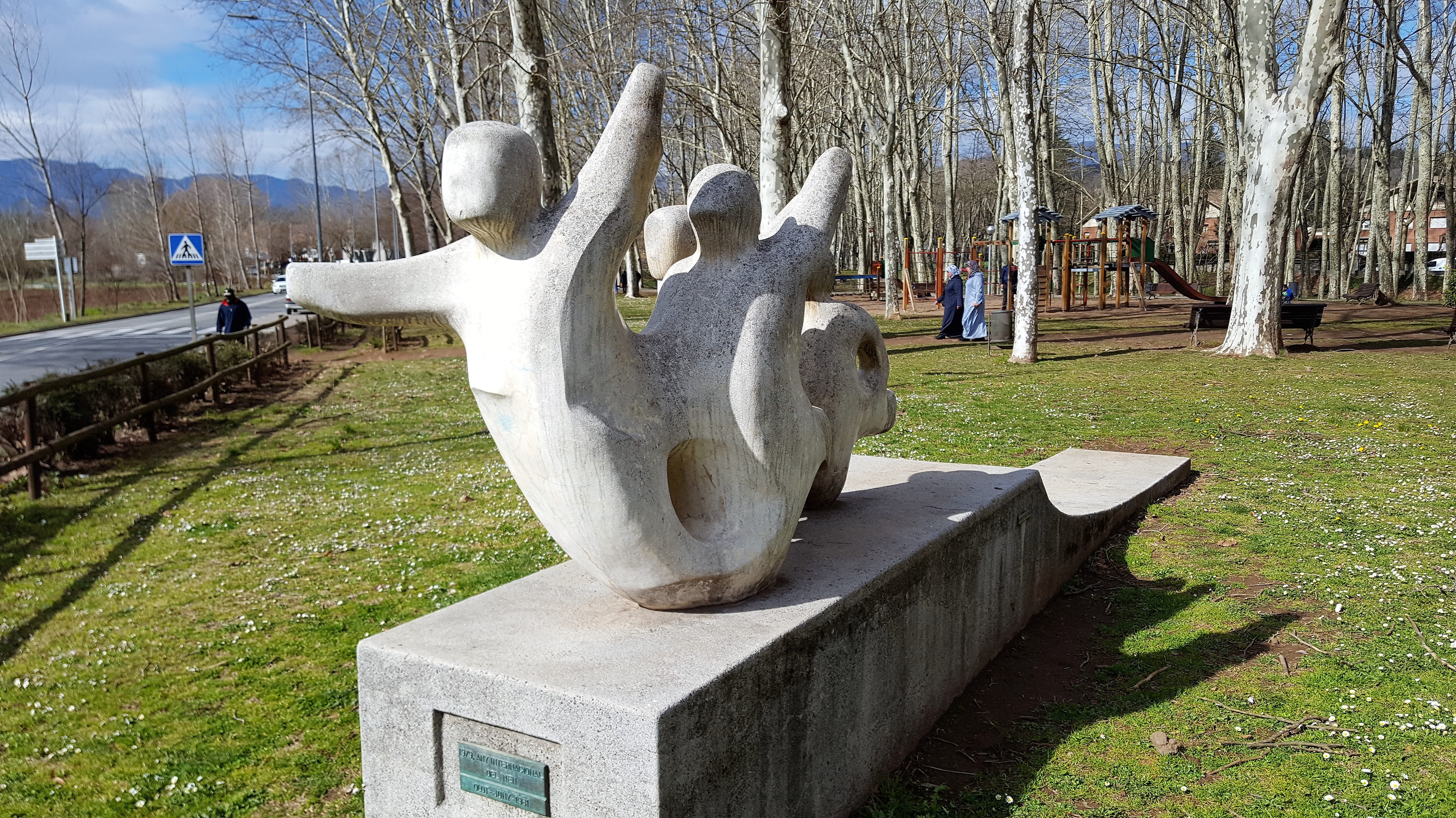 Rosa Serra: Al Nen (Dem Kind); Gruppe von vier spielenden Kindern. Olot 1981. Zum Jahr des Kindes 1979 (Olot, Plaça de les Móres)